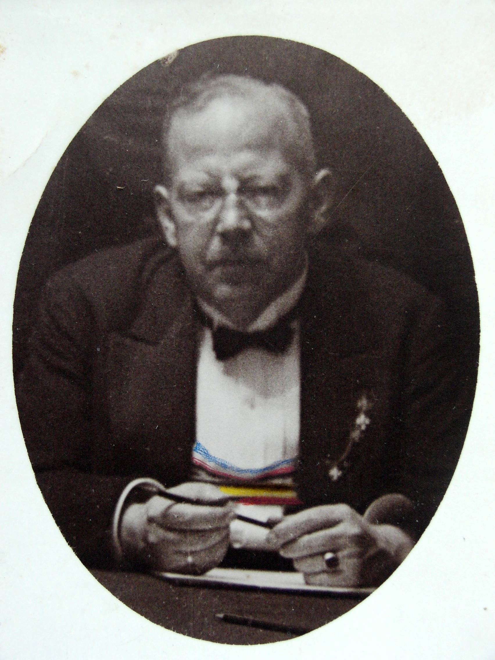 Fotografie von Erich tho Rahde